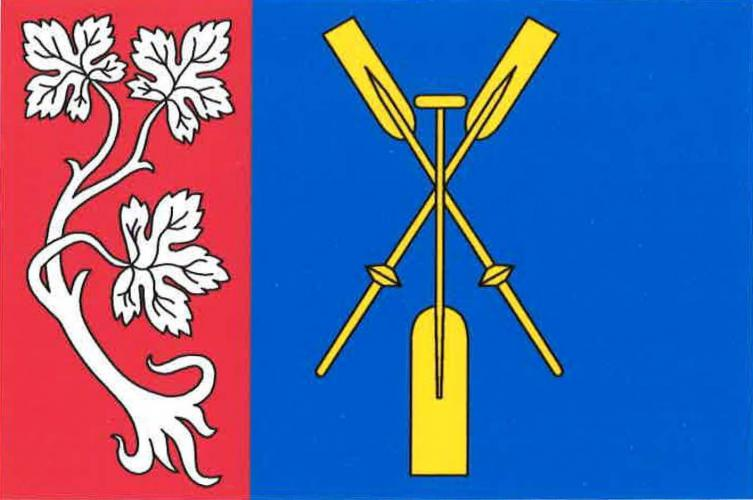 vlajka, Račice, okres Litoměřice